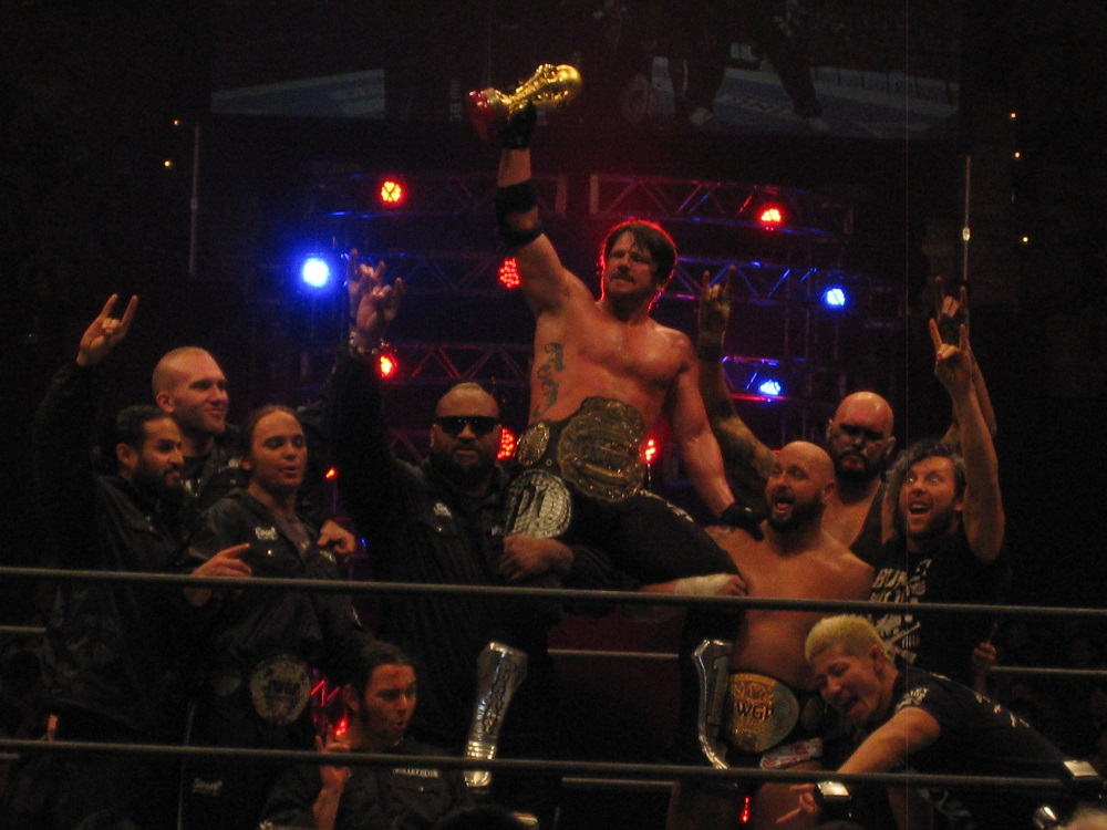 2015年2月11日 大阪府立体育会館 「THE NEW BEGINNING in OSAKA」 BULLET CLUB フルメンバー